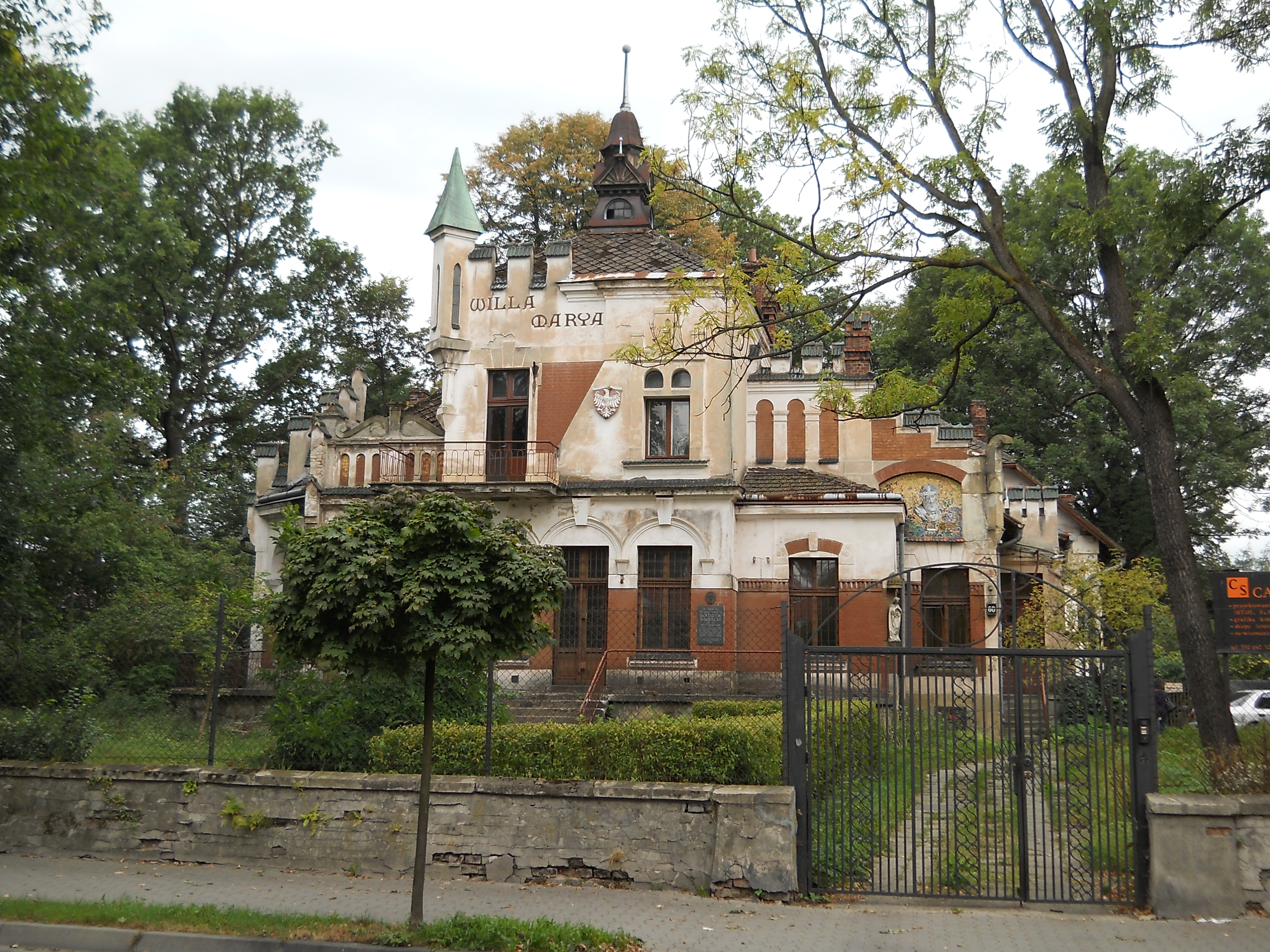 Nowy Sącz, zespół willi Marya, 1905-1908